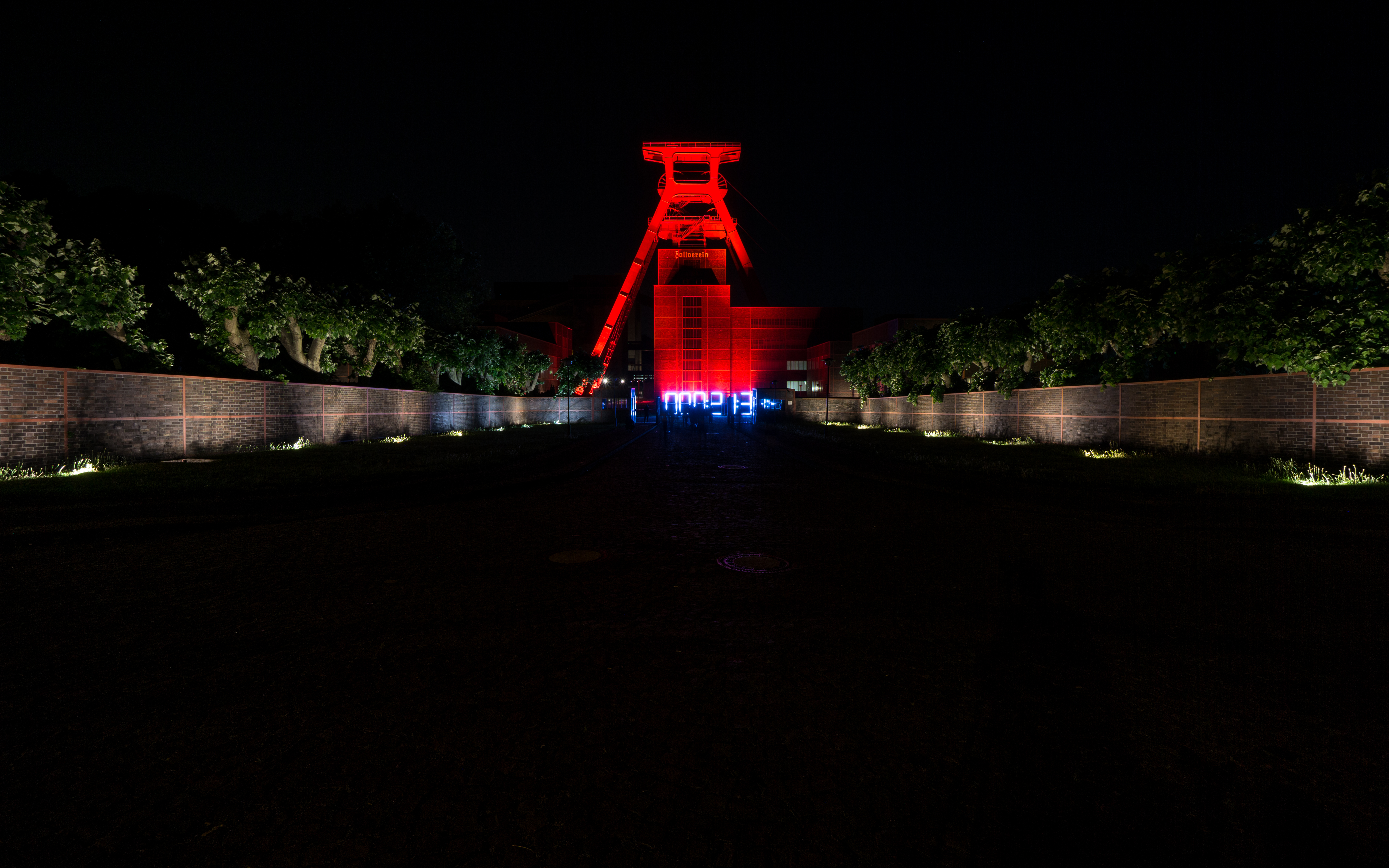 Schacht VII von Zeche Zollverein während der Night of Light 2020